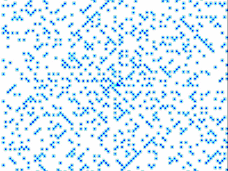 Espiral de Ullam